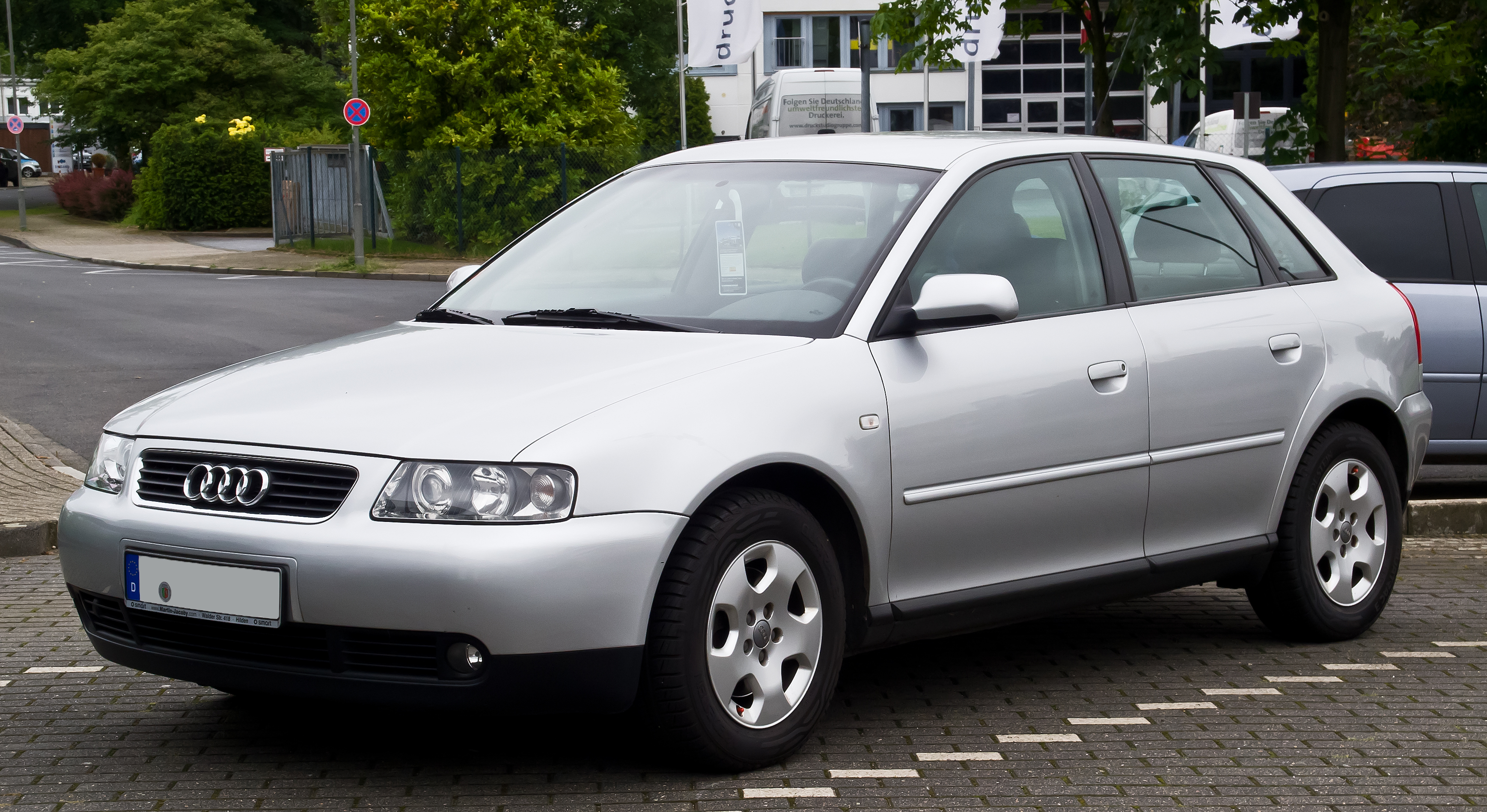 Audi A3 1.8 T (8L, Facelift)